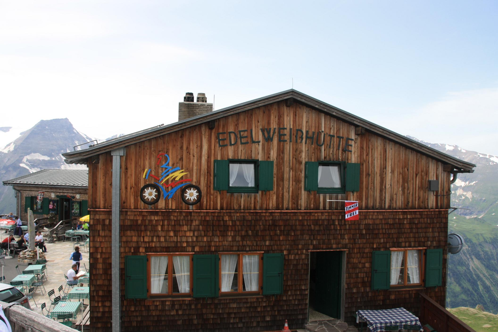 Die Edelweißhütte auf der Edelweißspitze an der Großglockner-Hochalpenstraße